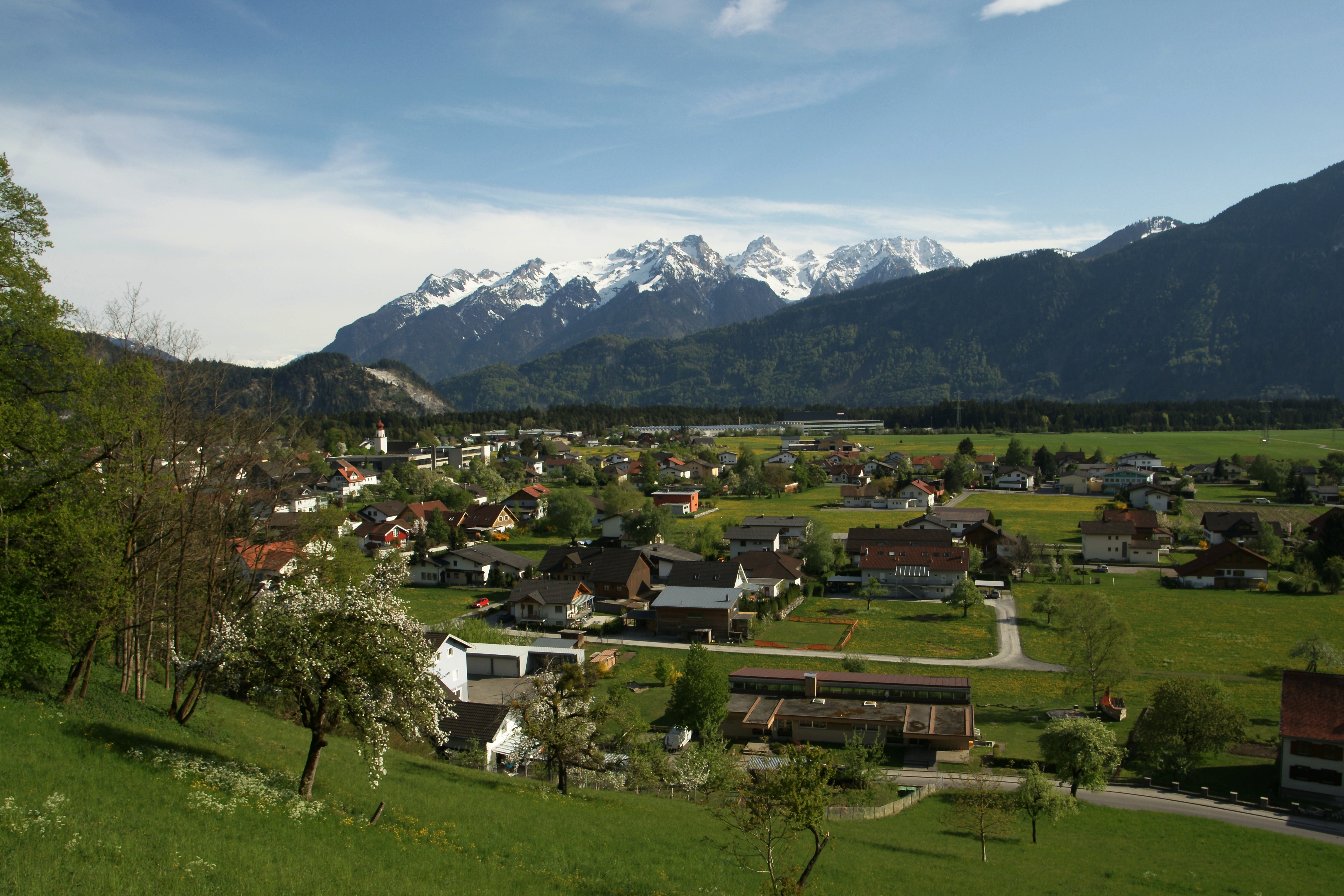 Blick vom “Ansitz Falkenhorst” über Thüringen zu den schneebedeckten Bergen .....